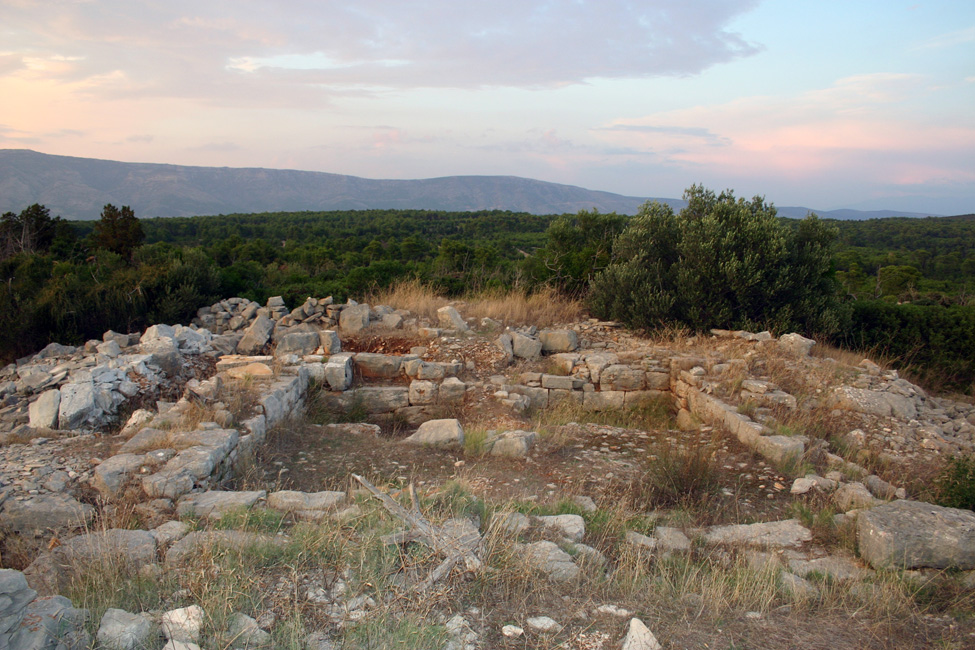 ostaci grčke kule Maslinovik u Starigradskom polju na Hvaru